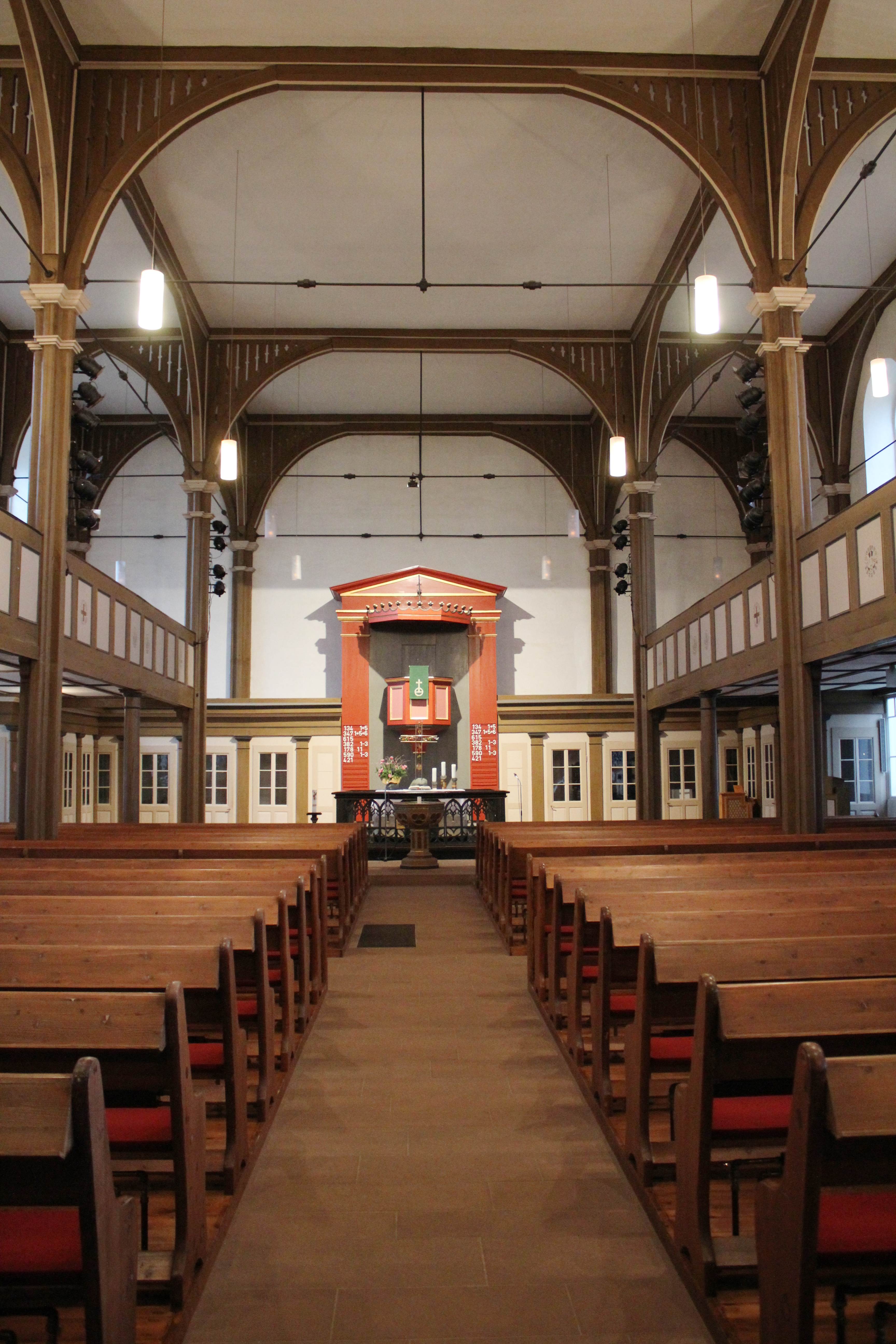 Evangelische Kirche Niedergründau, Gemeinde Gründau, Main-Kinzig-Kreis, Hessen, Deutschland